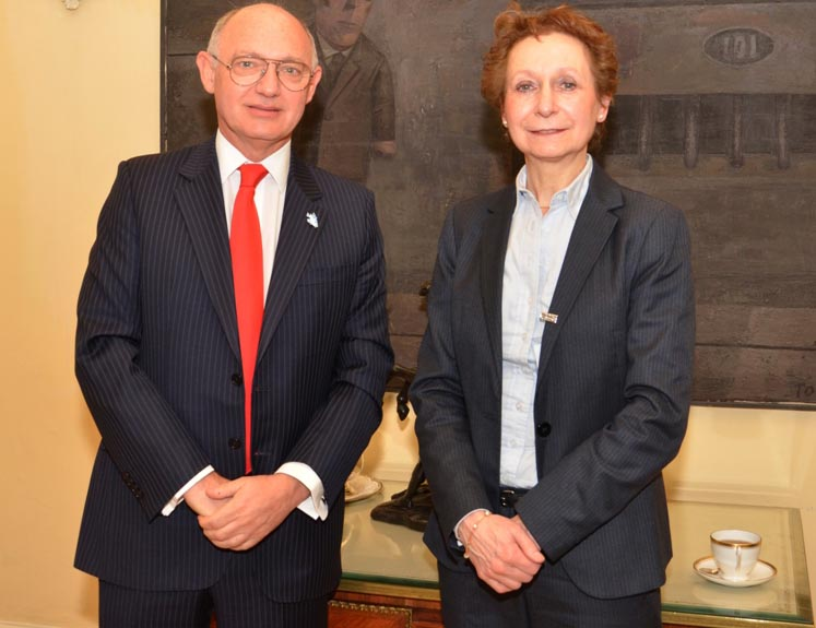 El canciller Héctor Timerman con la prestigiosa jurista internacional Sophie Thonon, miembro del Grupo Pro Diálogo sobre Cuestion Malvinas en Francia. El trabajo de Thonon como abogada de los familiares de las víctimas logró la cadena perpetua para el ex marino Alfredo Astiz.